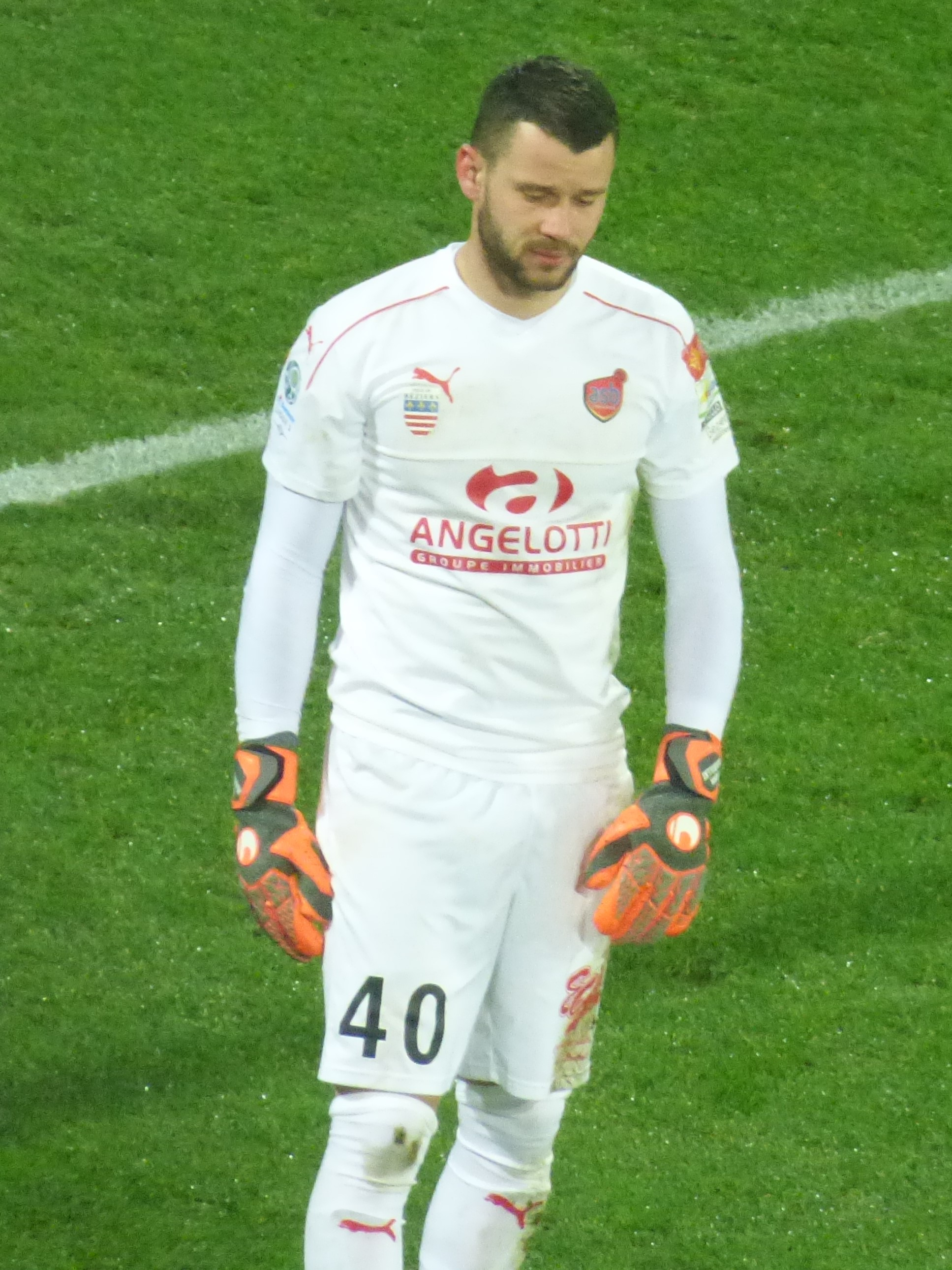 Yan Marillat pendant le match RC Lens / AS Béziers, comptant pour la 23ème journée du championnat de France de football de Ligue 2 2018-2019, le 4 février 2019, au Stade Bollaert-Delelis.